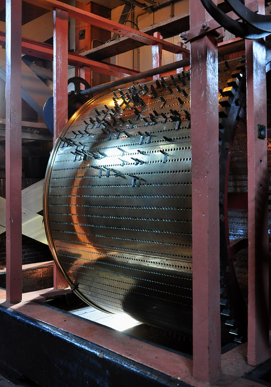 Speeltrommel voor het automatisch spel van het klokkenspel in de toren van Nijkerk.